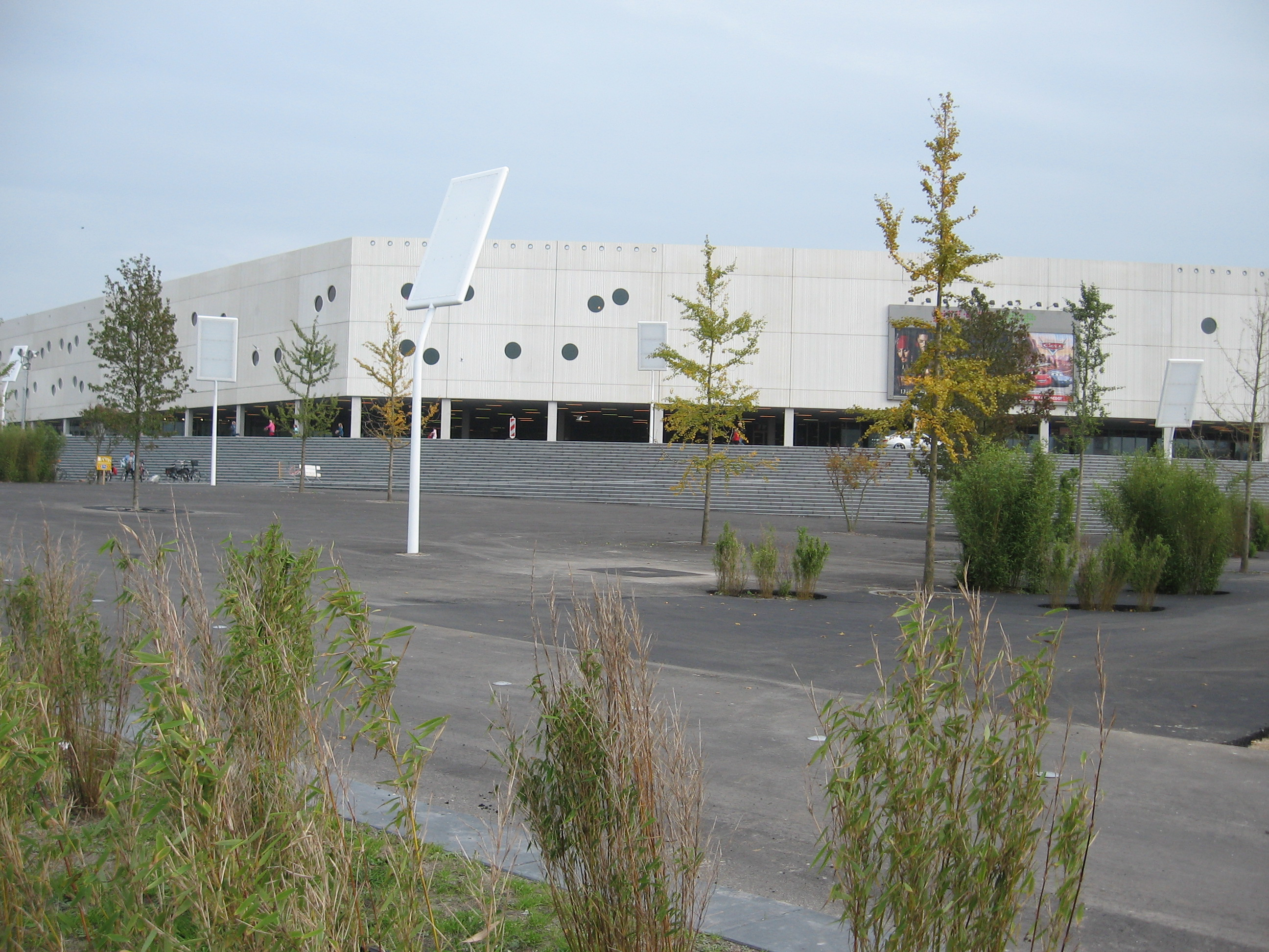 Description De Euroborg in Groningen vanaf de Boumaboulevard gezien Date18 October 2006SourceOwn workAuthorKevsterPermission (Reusing this file) Vrijgegeven onder GFDL. De Euroborg in Groningen vanaf de Boumaboulevard gezien